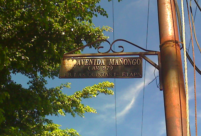 Aviso en Naguanagua, remanente de la época cuando era una parroquia del Municipio Valencia (llamado "Distrito Valencia" en su momento)